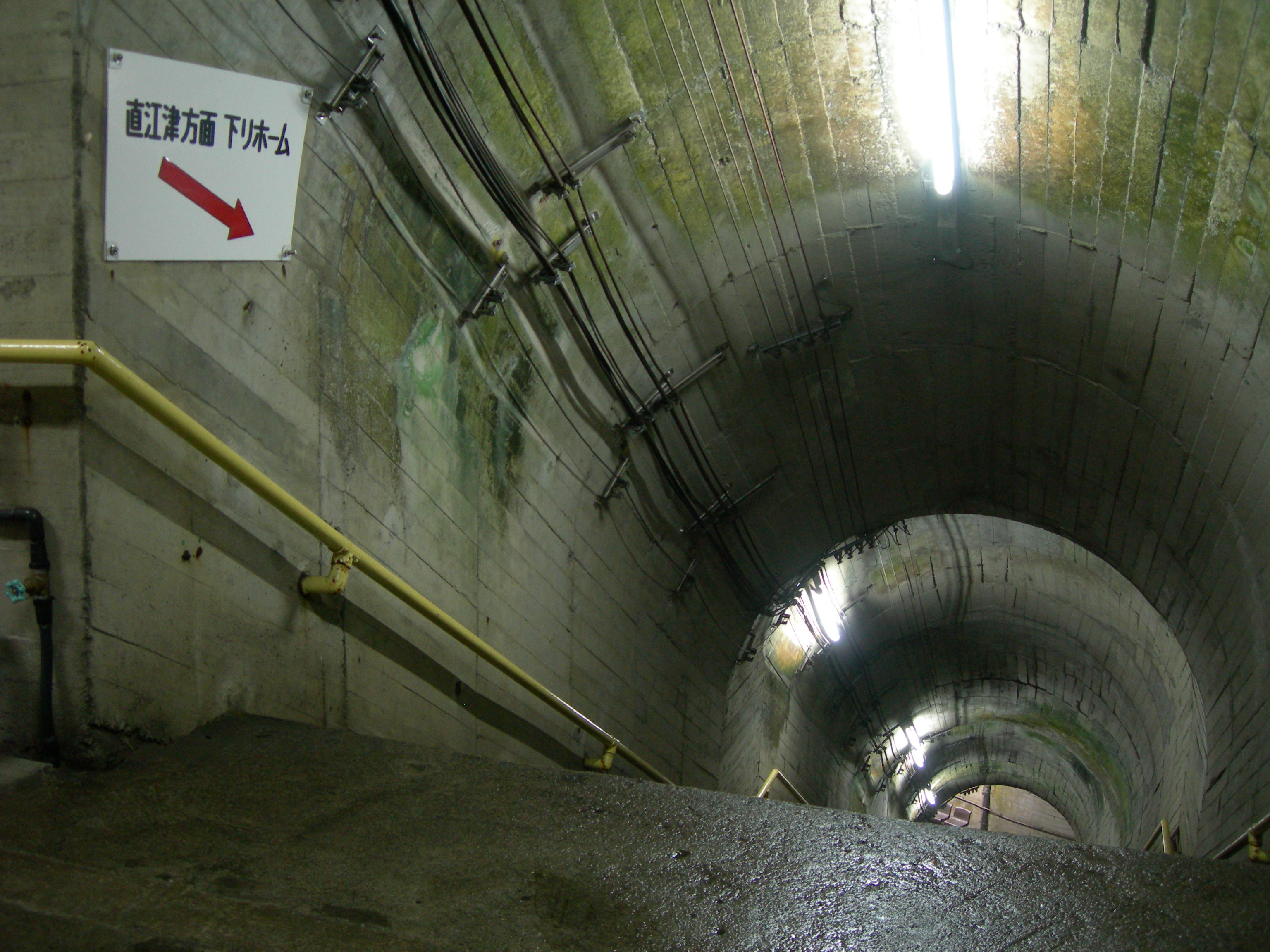 筒石駅の下りホームへ降りる階段の一番上から一番下を撮る、待合室のベンチが小さく写っている